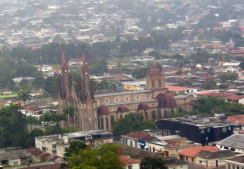 Foto de la Iglesia Santa Barbara de Rubio